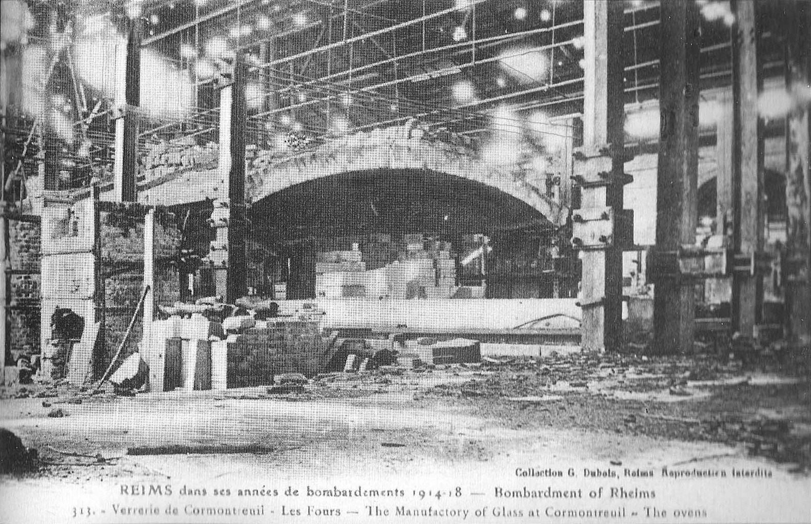 Le_four_de_la_verrerie_Charbonneaux détuit_par_les_allemands_14-18.